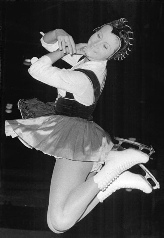 Nicole Hassler Zentralbild Kohls 14.10.1963 Festtag des Eissports Am Geburtstagsabend unserer sozialistischen Sportbewegung (13.10.1963) überbrachte die Kunstlauf-Elite Frankreichs, Österreichs und der DDR in der Berliner Werner-Seelenbinder-Halle noch ein besonderes Präsent: Gemeinsam Klasseleistungen. UBz: Zum ersten Mal weilte die Dritte der weltmeisterschaften und Vizeeuropameisterin, Nicole Hassler aus Chamonix in der DDR. Die charmante Französin lief sich sehr schnell in die Herzen der Zuschauer.